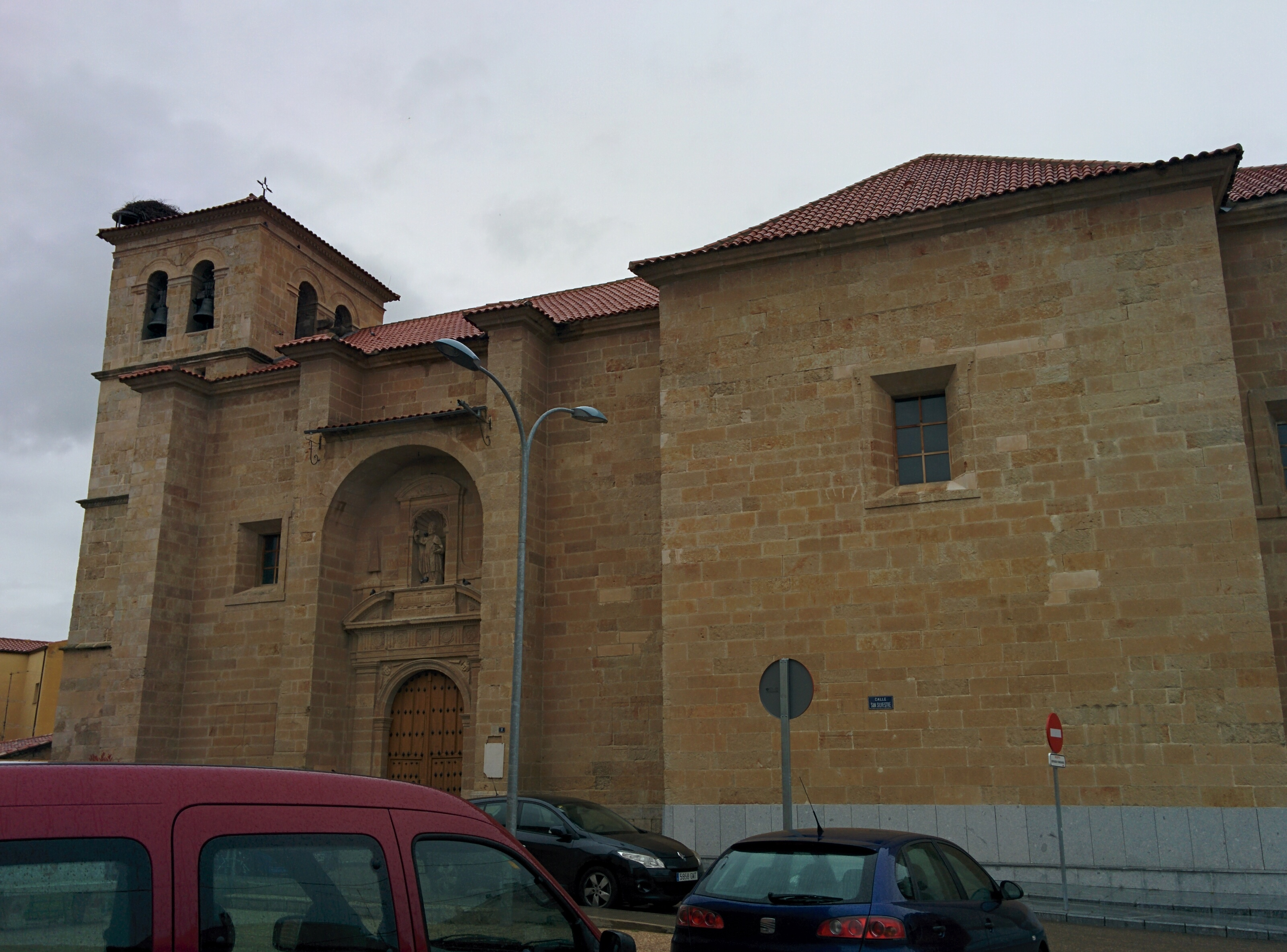 Iglesia de San Silvestre, en Villares de la Reina (Salamanca, España).